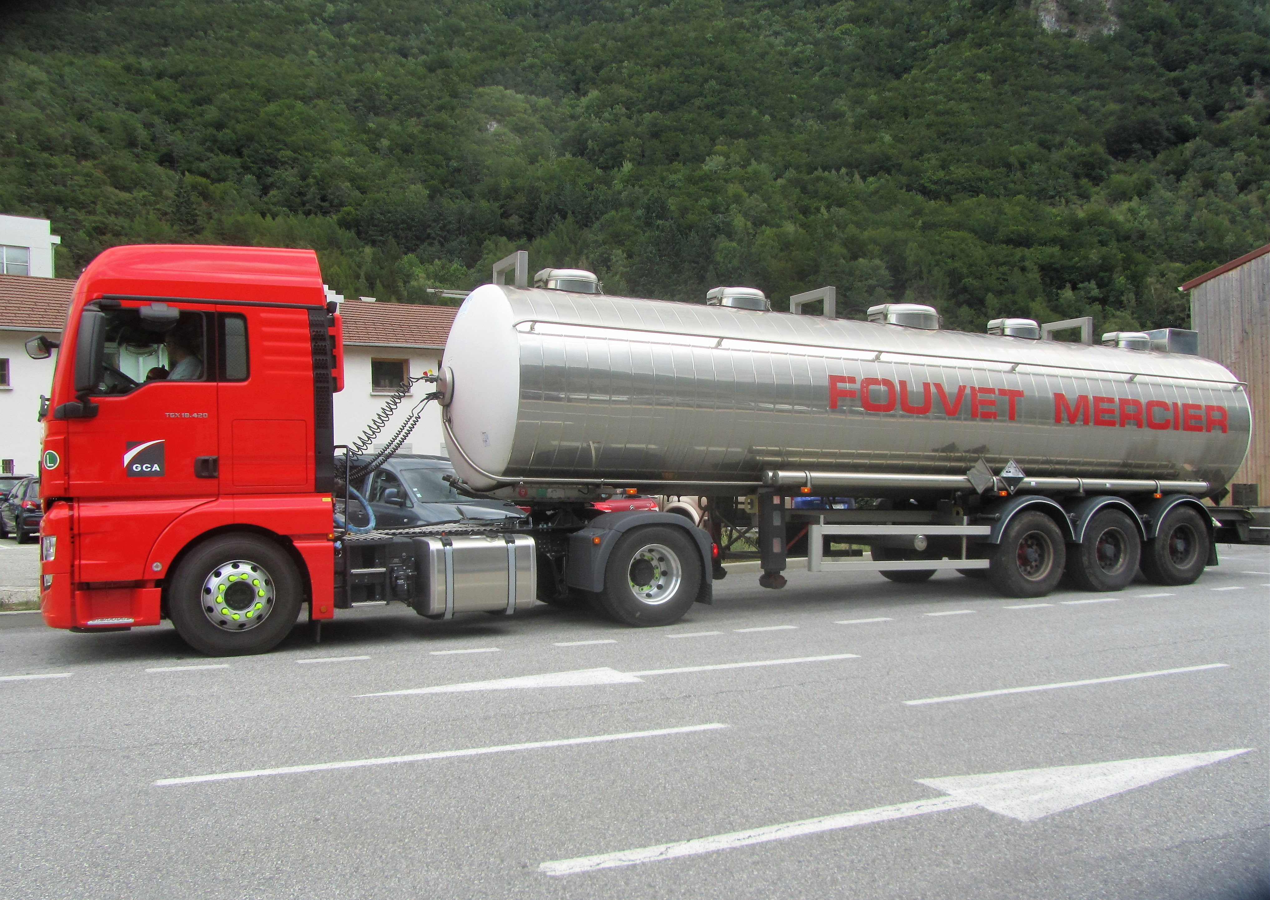 wagon spécial pour l'usine de Pomblière